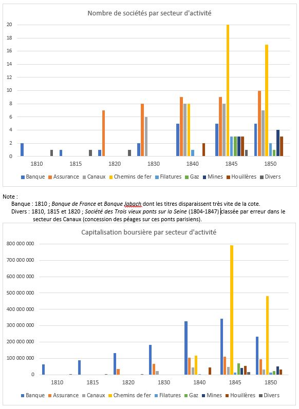 Secteurs d'activité à la bourse de Paris (1810-1850)